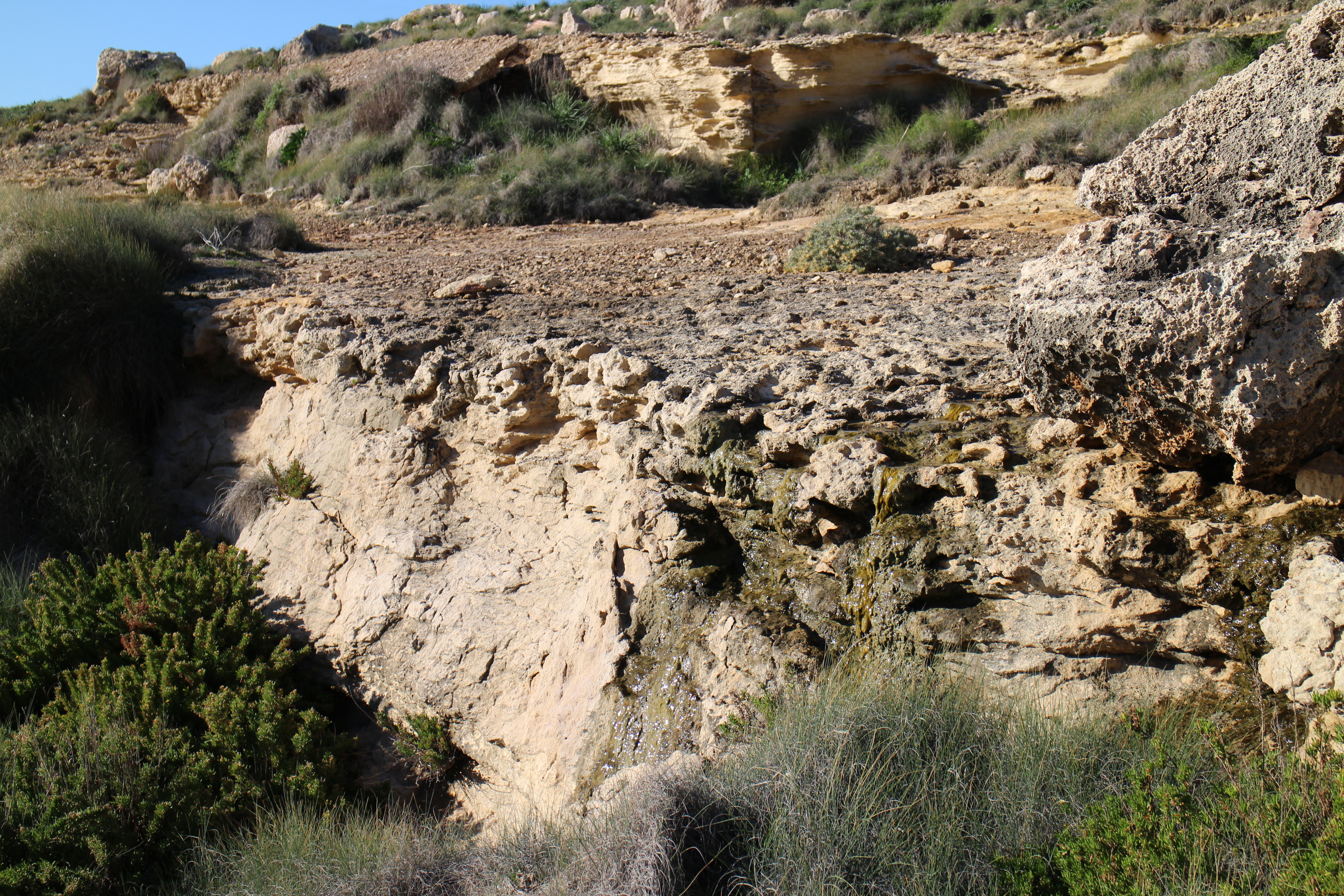 Ras ir-Raheb